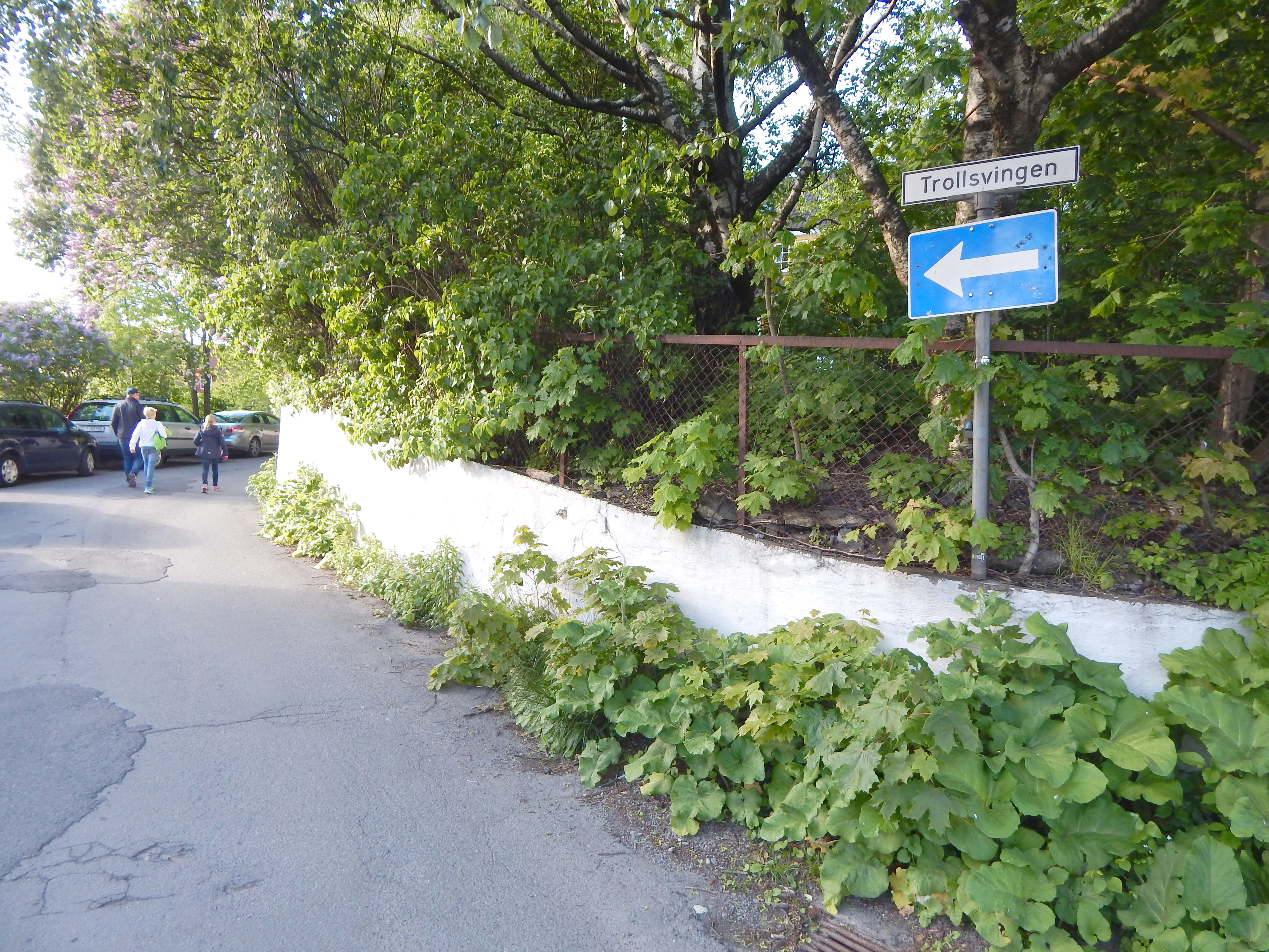 Trollsvingen sett fra Bergsalleen